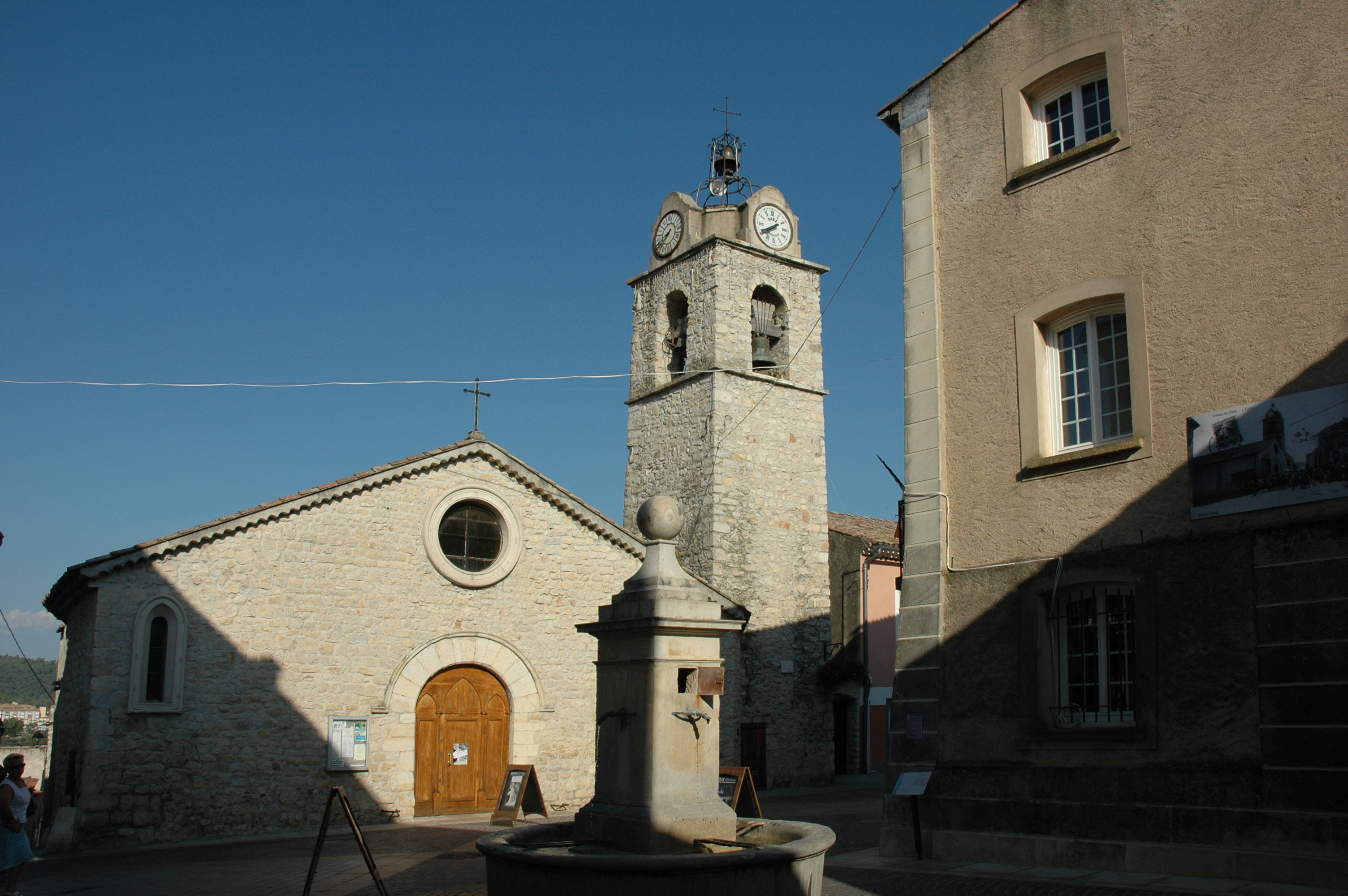 Église Notre-Dame-des-Ormeaux (Gréoux-les-Bains)